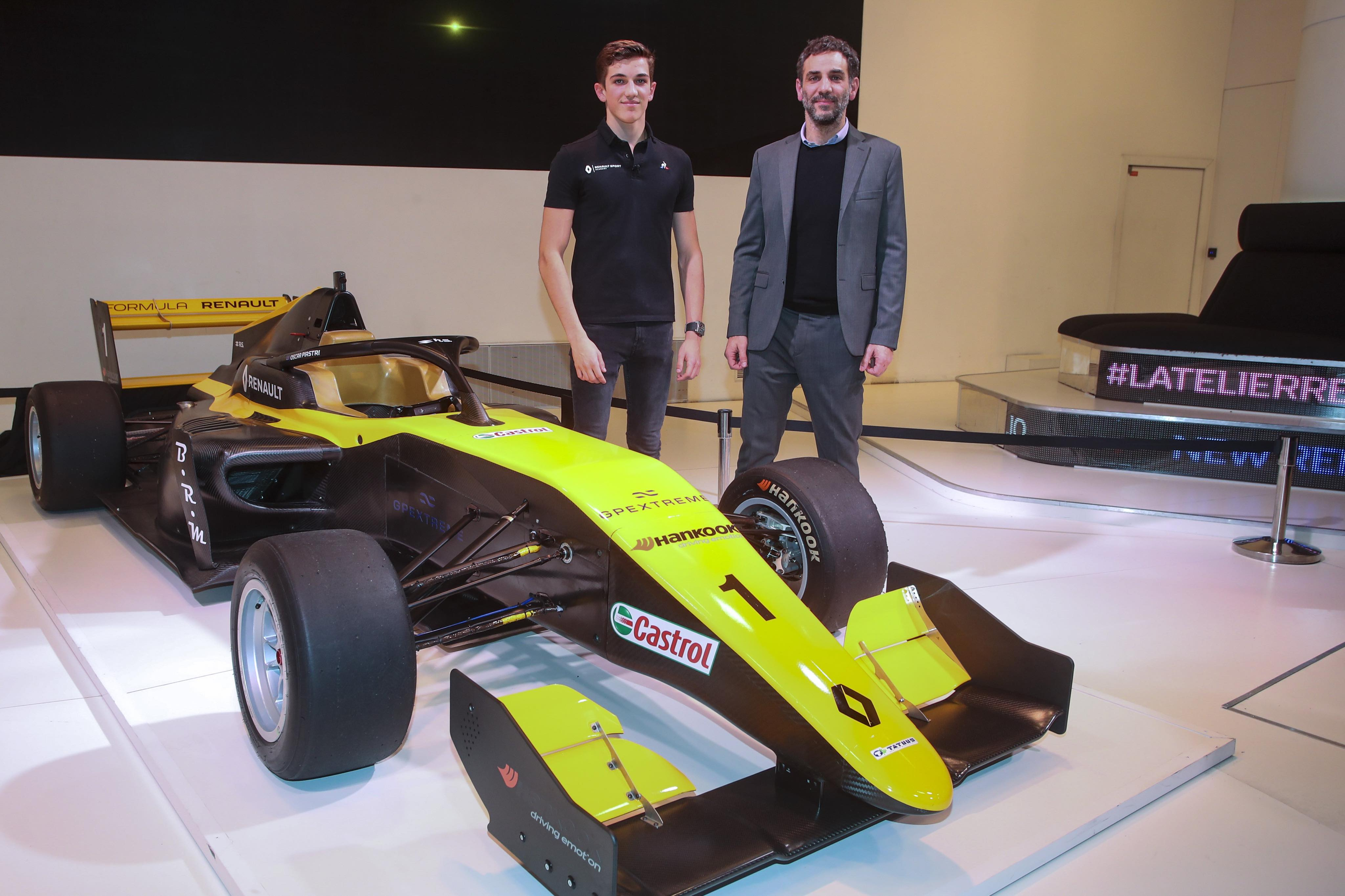 Photographie d'Hadrien David et de Cyril Abiteboul, à côté de la nouvelle Formule Renault Eurocup de 2020 à l'Atelier Renault.